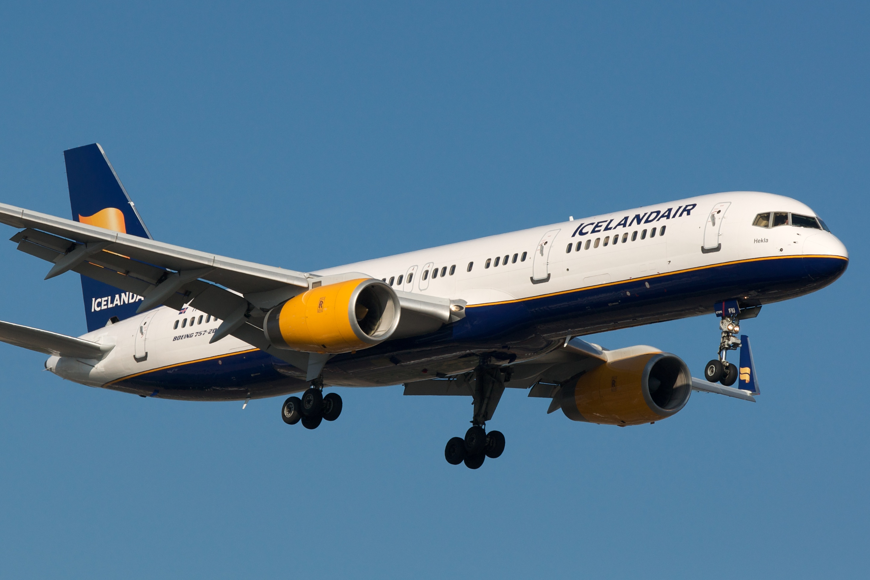 Icelandair 757-200 TF-FIU